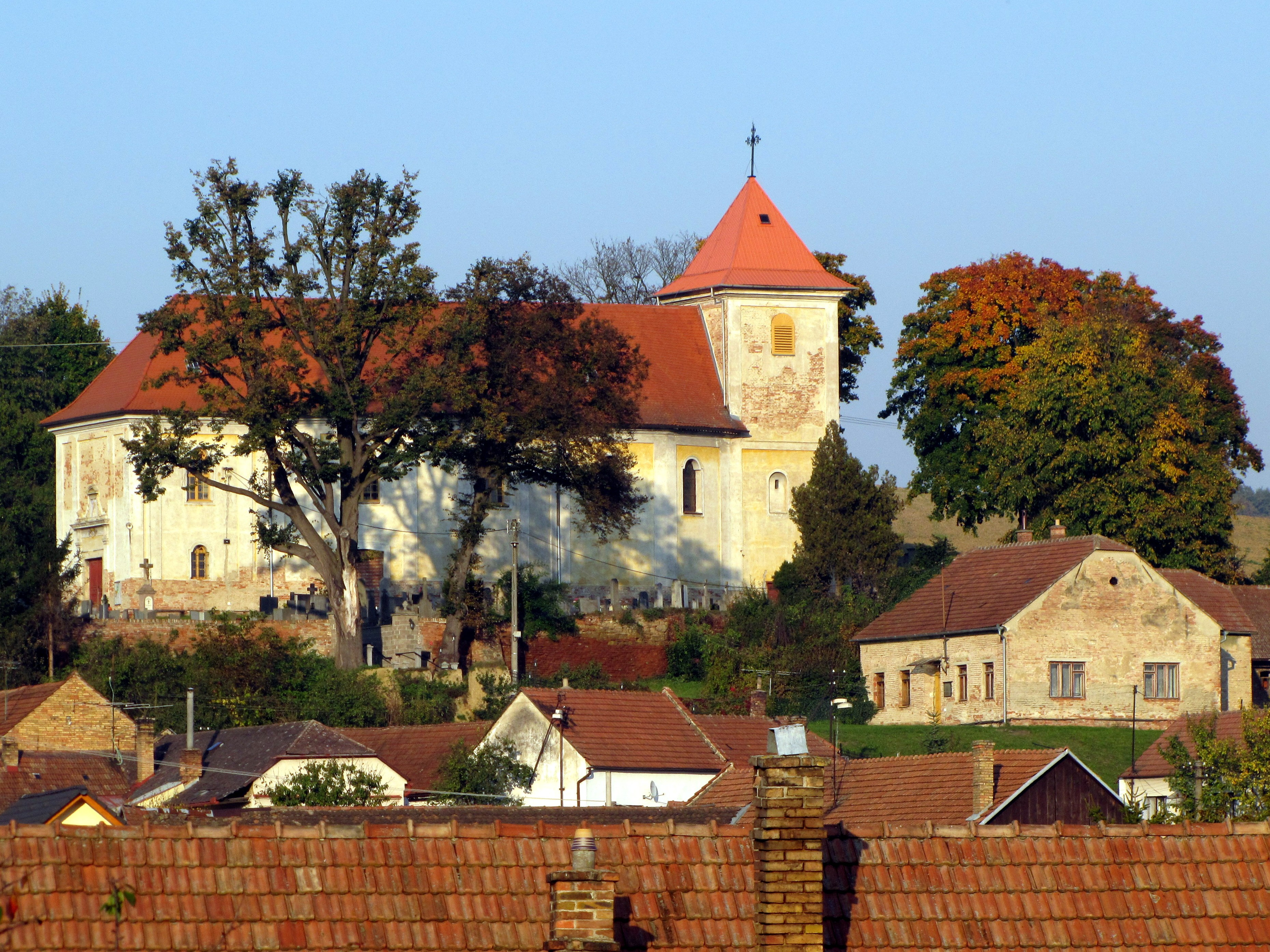 Kostel sv. Václava v Nemoticích, okres Vyškov